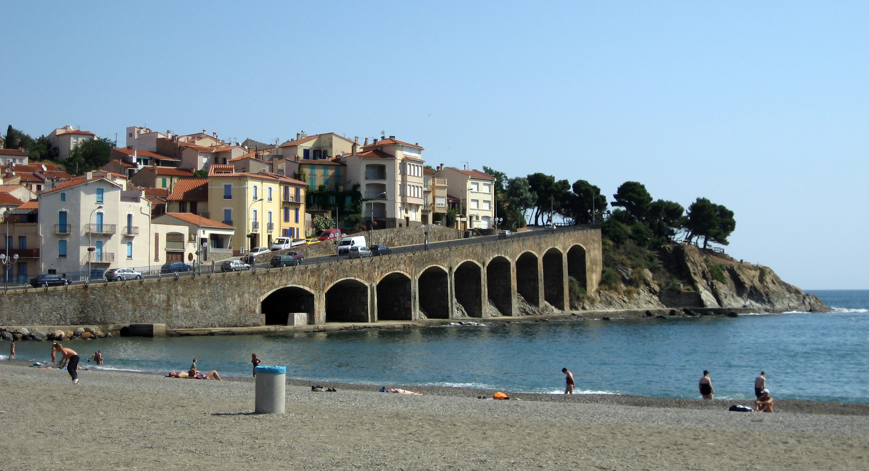 Banyuls-sur-Mer